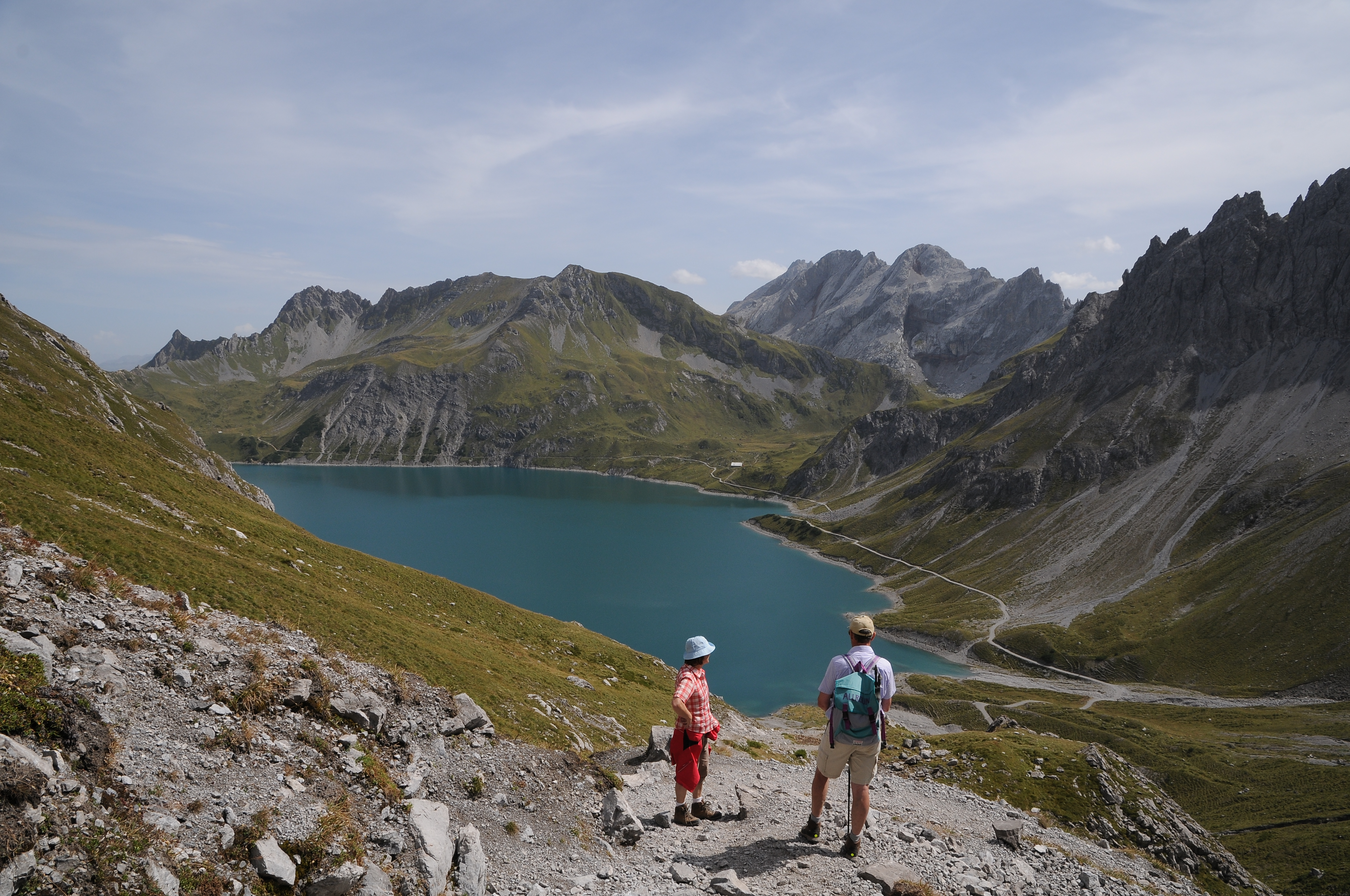 Von der Totalphütte kommend, richtet sich der Blick über den Lünersee von links nach rechts: Freschluakopf, Zaluanderkopf, Rossberg, die Drusenfluh sowie auf die Kirchlispitzen.